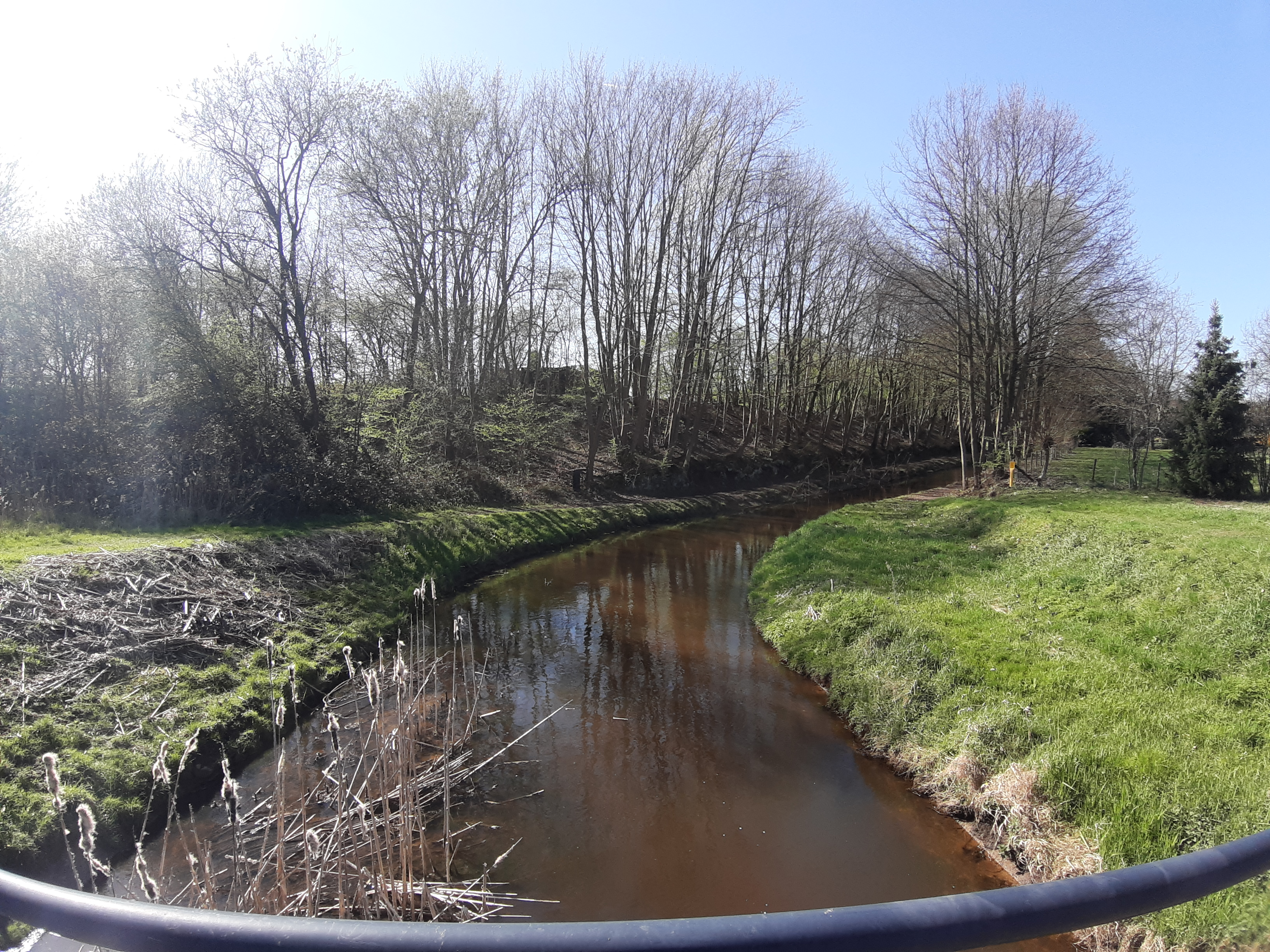 De Schoonwaterleiding gezien vanaf het aquaduct.